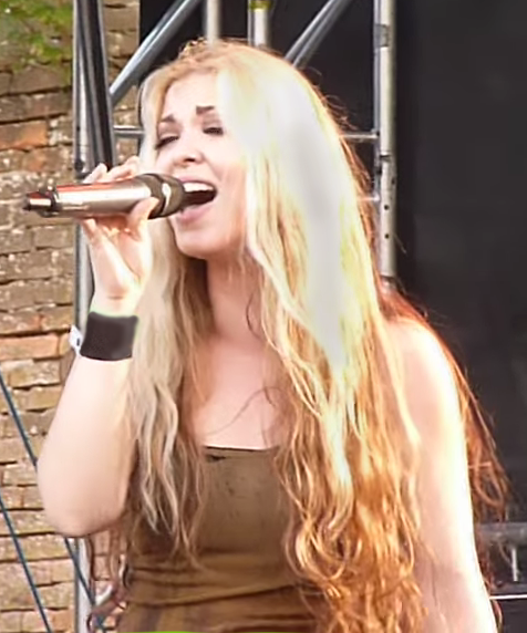 vocalista de The Agonist